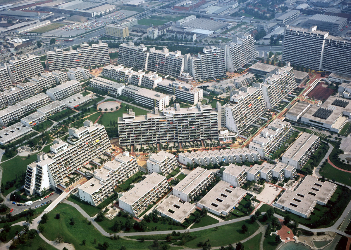 Das Olympiadorf mit Connollystrasse nach NO. Hier geschah 1972, während der Olympiade '72, der Anschlag auf die Sportler.